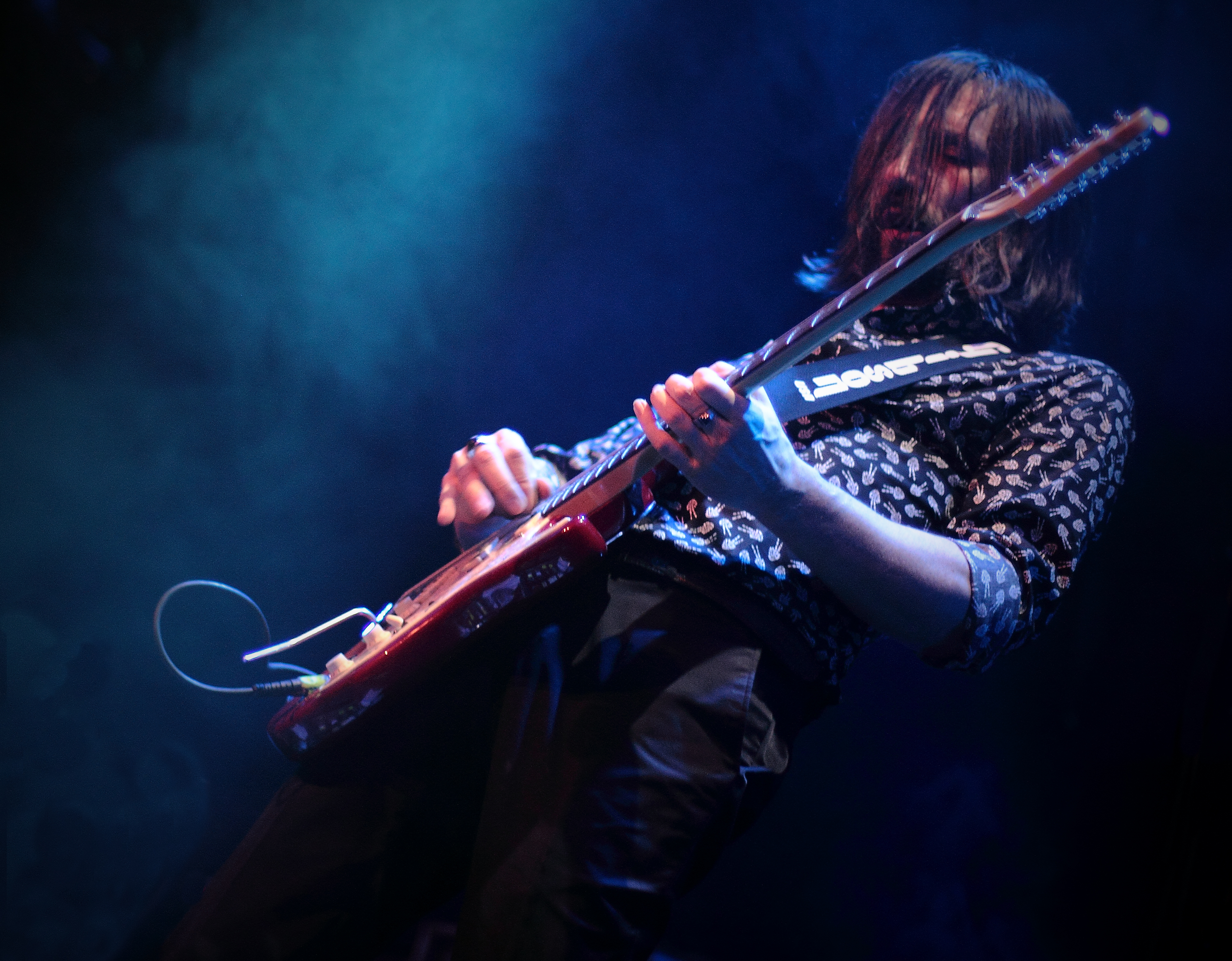 Cristiano Godano live con i Marlene Kuntz durante il tour “Onorate il Vile” del 2017 allo Spazio 900 di Roma.